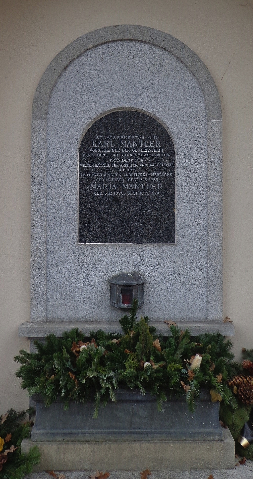 Feuerhalle Simmering - Abteilung ML (Umfassungsmauer): Urnengrab von Karl Mantler